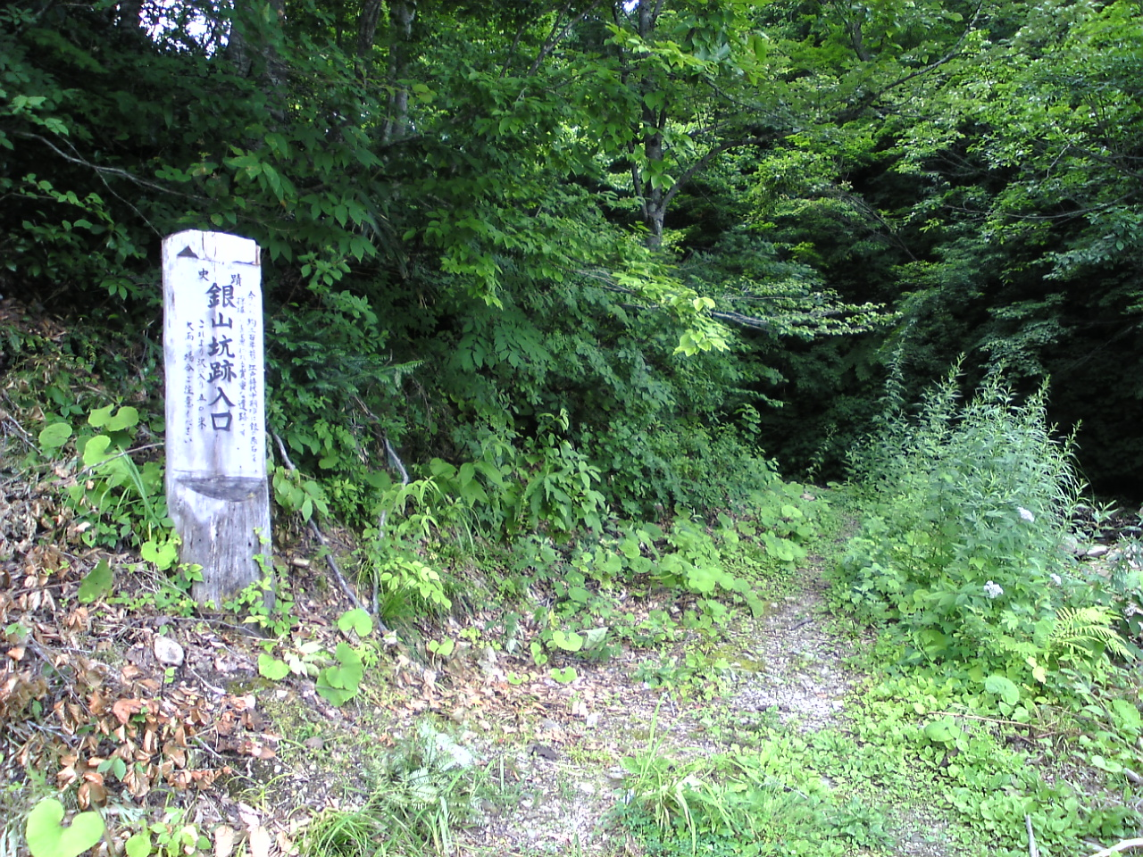 奥只見銀山跡